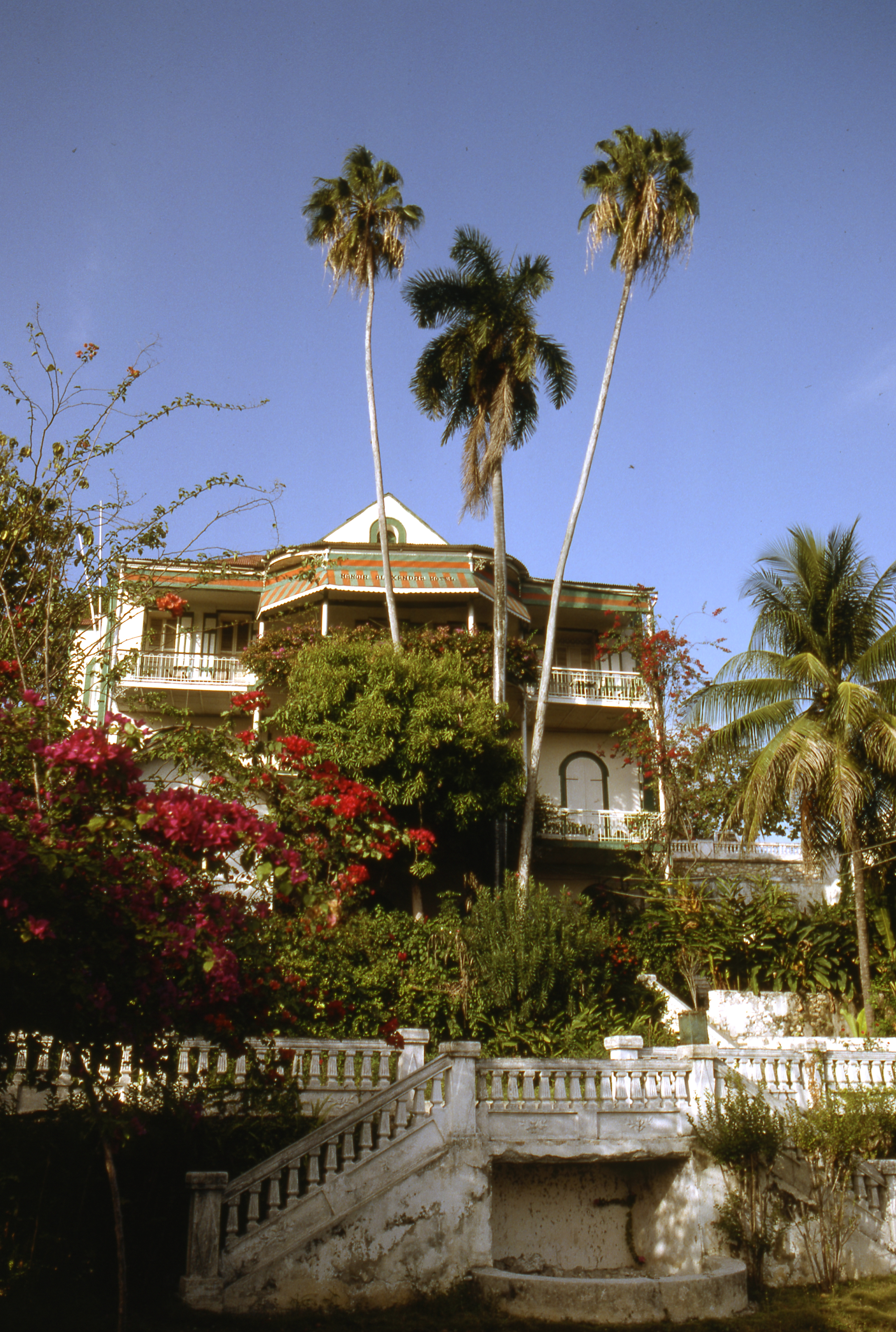 photo du Manoir en 1982 réalisée par Georges Fabre (agence Fabre Calmus Caraïbes et Tropiques illustration photographique)